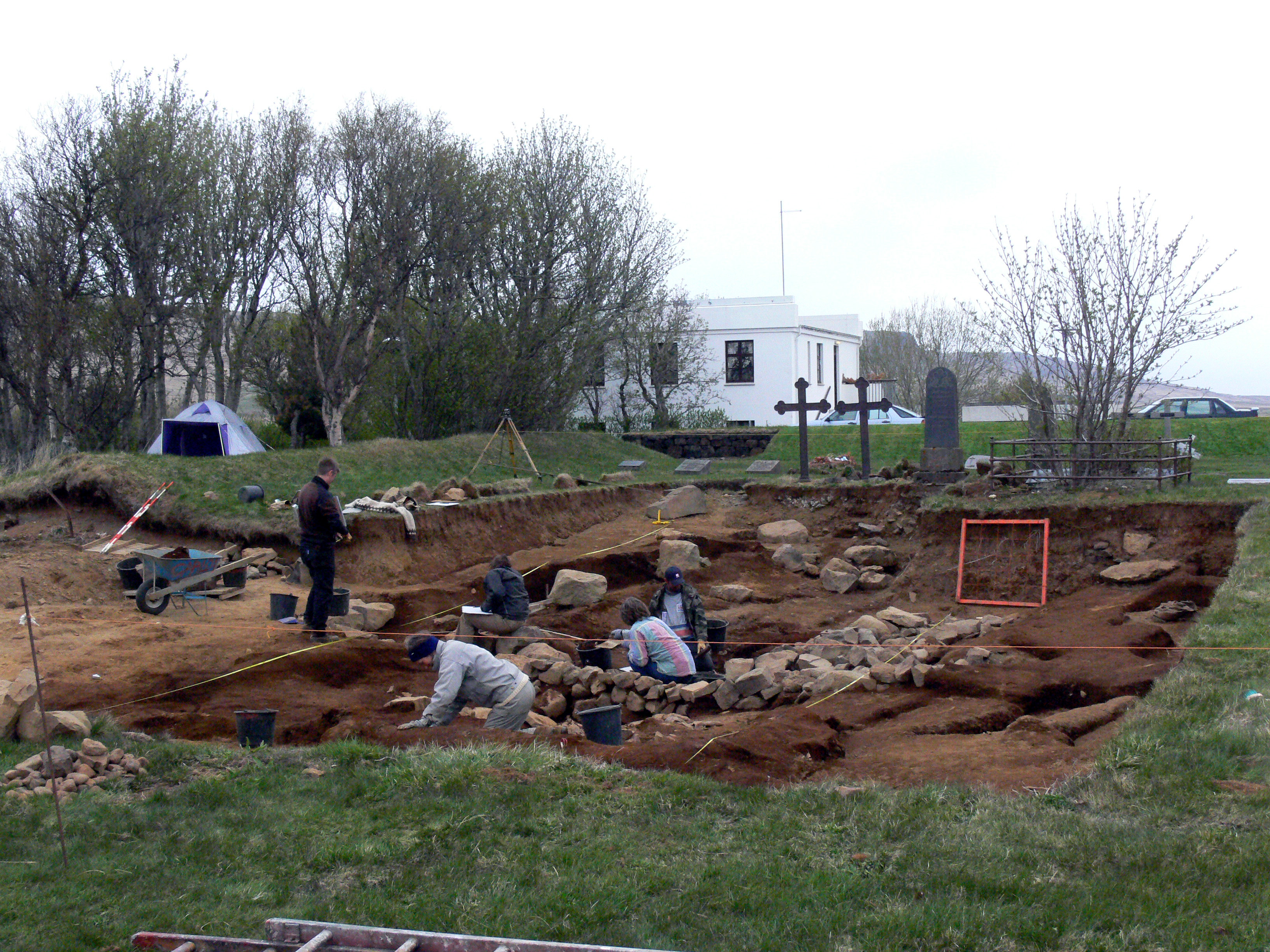 Reykholt. Ausgrabung der ältesten Kirche.